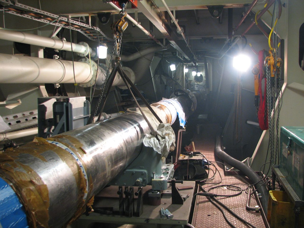 Flensburger Schiffbau Gesellschaft